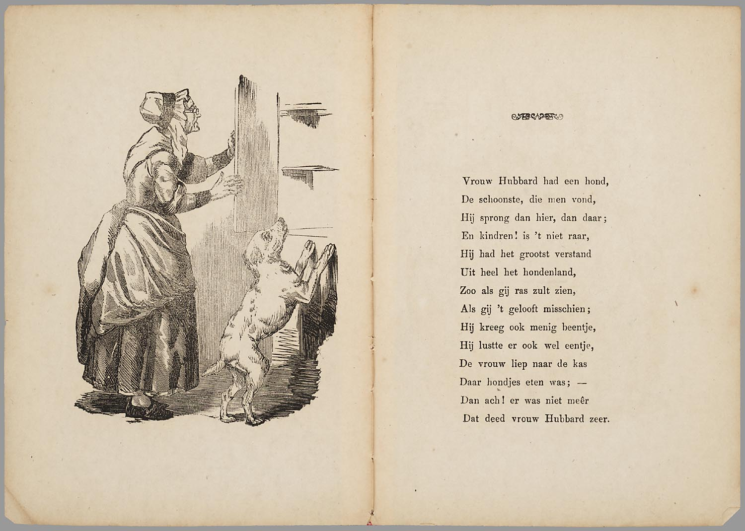 Prentenboek met ongekleurde gravures naast of boven de rijmende tekst, met het verhaal dat gebaseerd is op een Engels bakerrijm. Een vrouw doet van alles voor haar hond die eerst dood ligt, dan weer leeft, een pijp rookt, in een stoel zit, op zijn kop staat, de kat voert, danst, fluit speelt, op een bok rijdt en de krant leest. Hij spint en gaat gekleed uit, en laat dan zijn vrouwtje ondankbaar in de steek. Op dun papier gedrukt. f 0,40 // Bevat een 'Besluit' met 'een woordje om over te denken', waarin de deugd van dankbaarheid wordt aangeprezen // Bew.van: Old Mother Hubbard // De keerzijde der bladen is onbedrukt, behalve de laatste // 16 bl, 2 p : houtgrav Antropomorfistische verhalen // Bakerrijmen // Honden // Humoristische verhalen // Prentenboeken